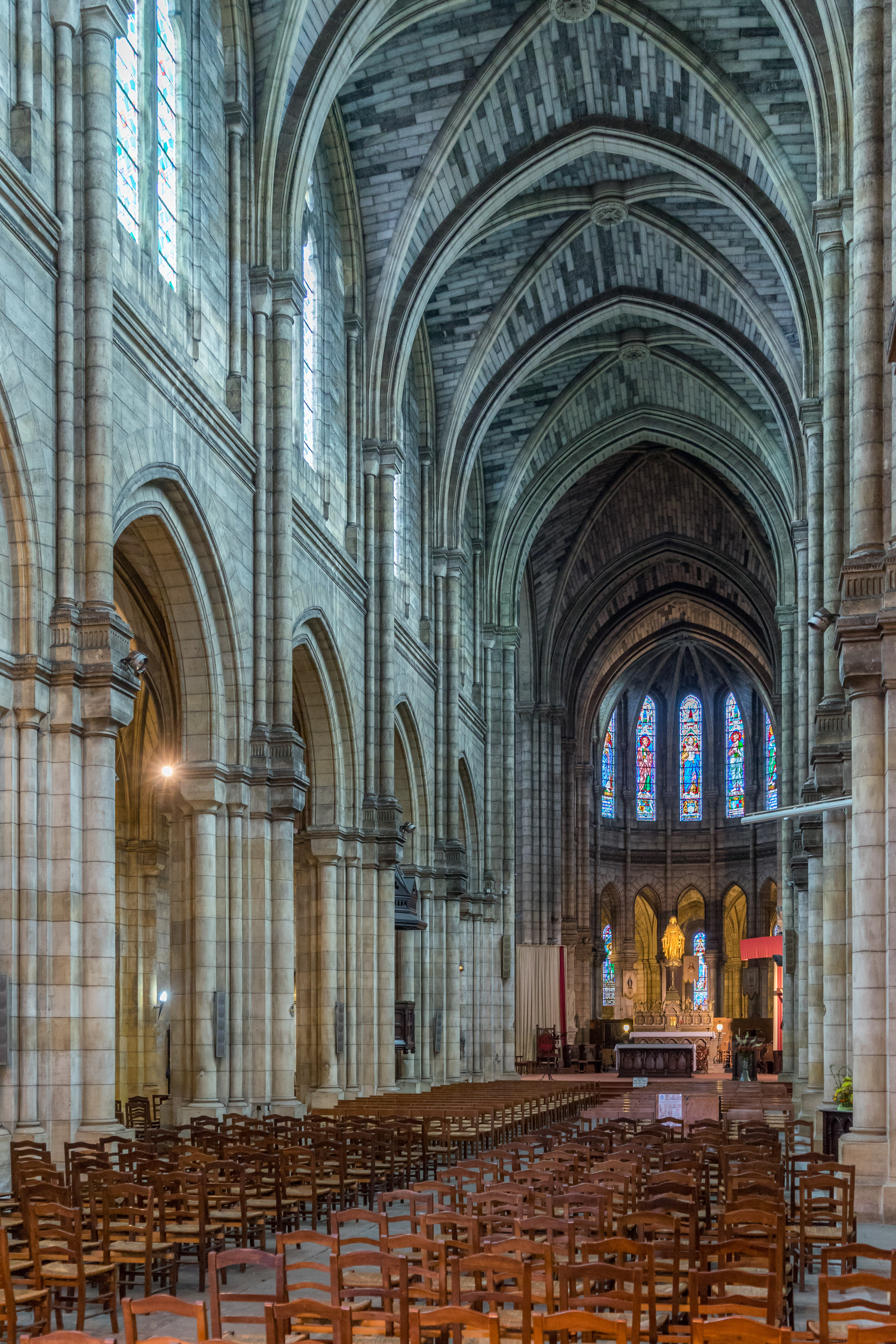 Bergerac - Notre-Dame - Nef